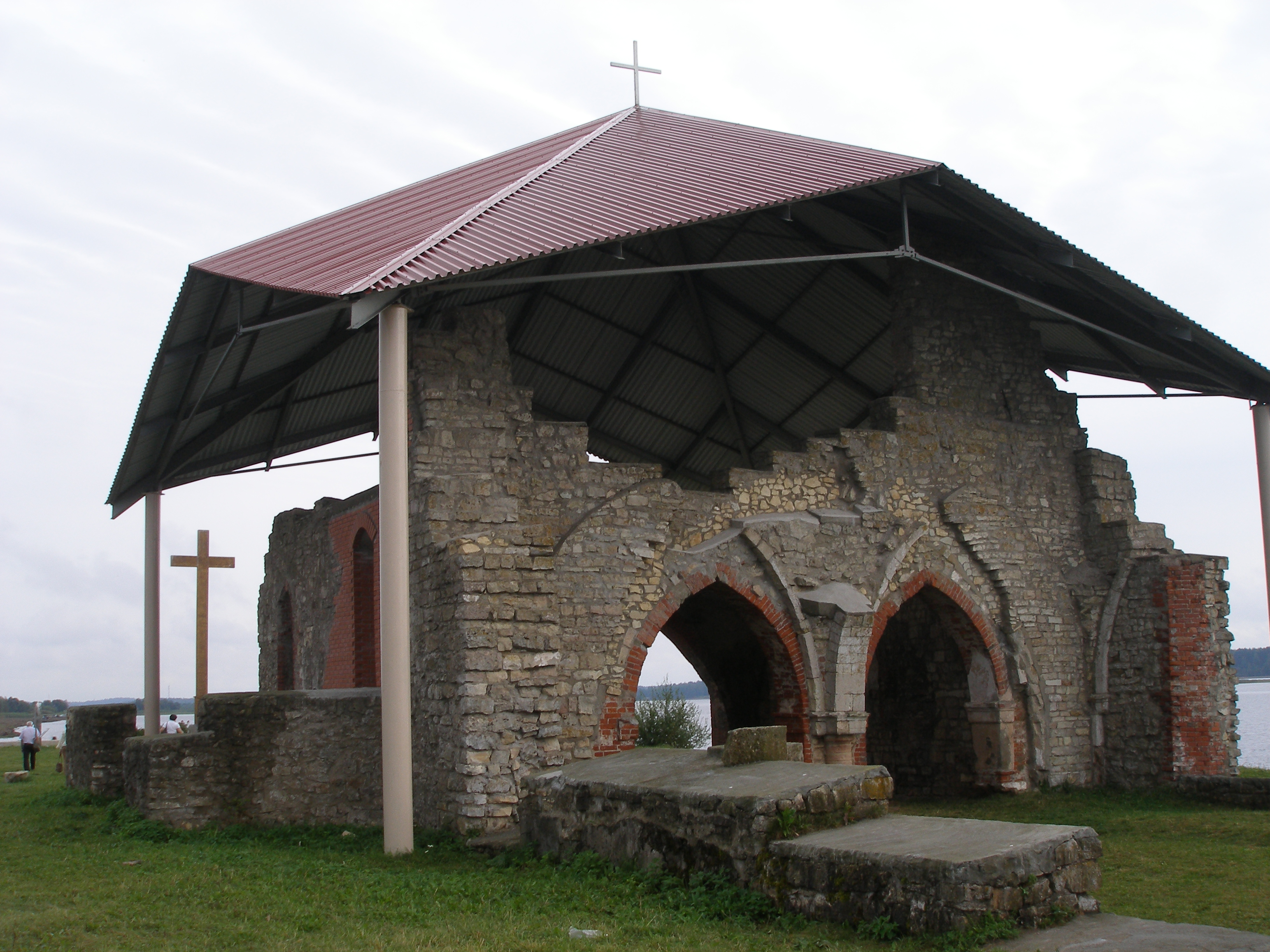 Ikšķiles baznīcas drupas